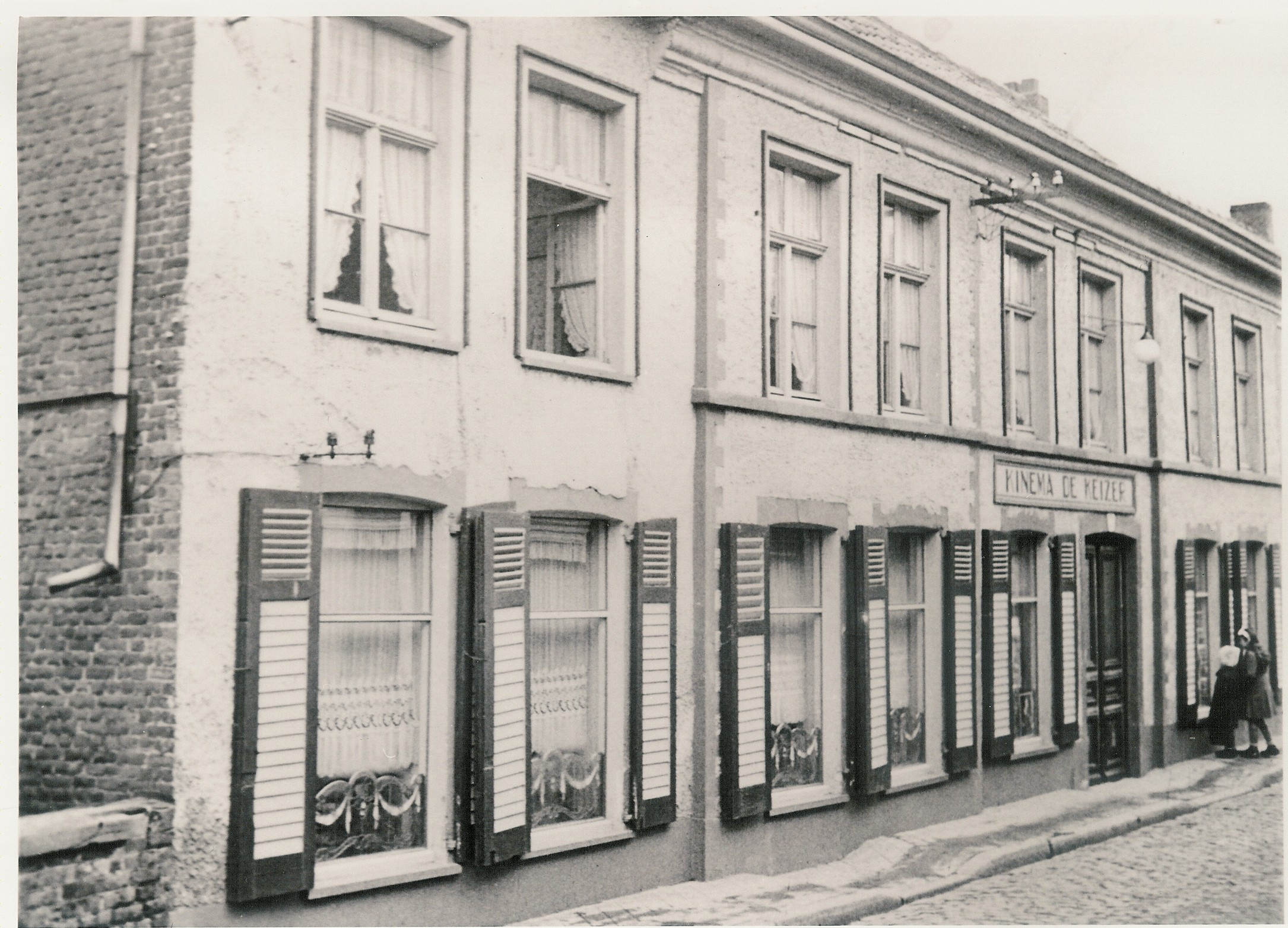 Kinema De Keizer